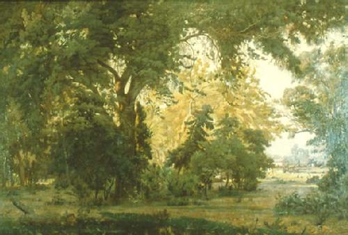 paisaje